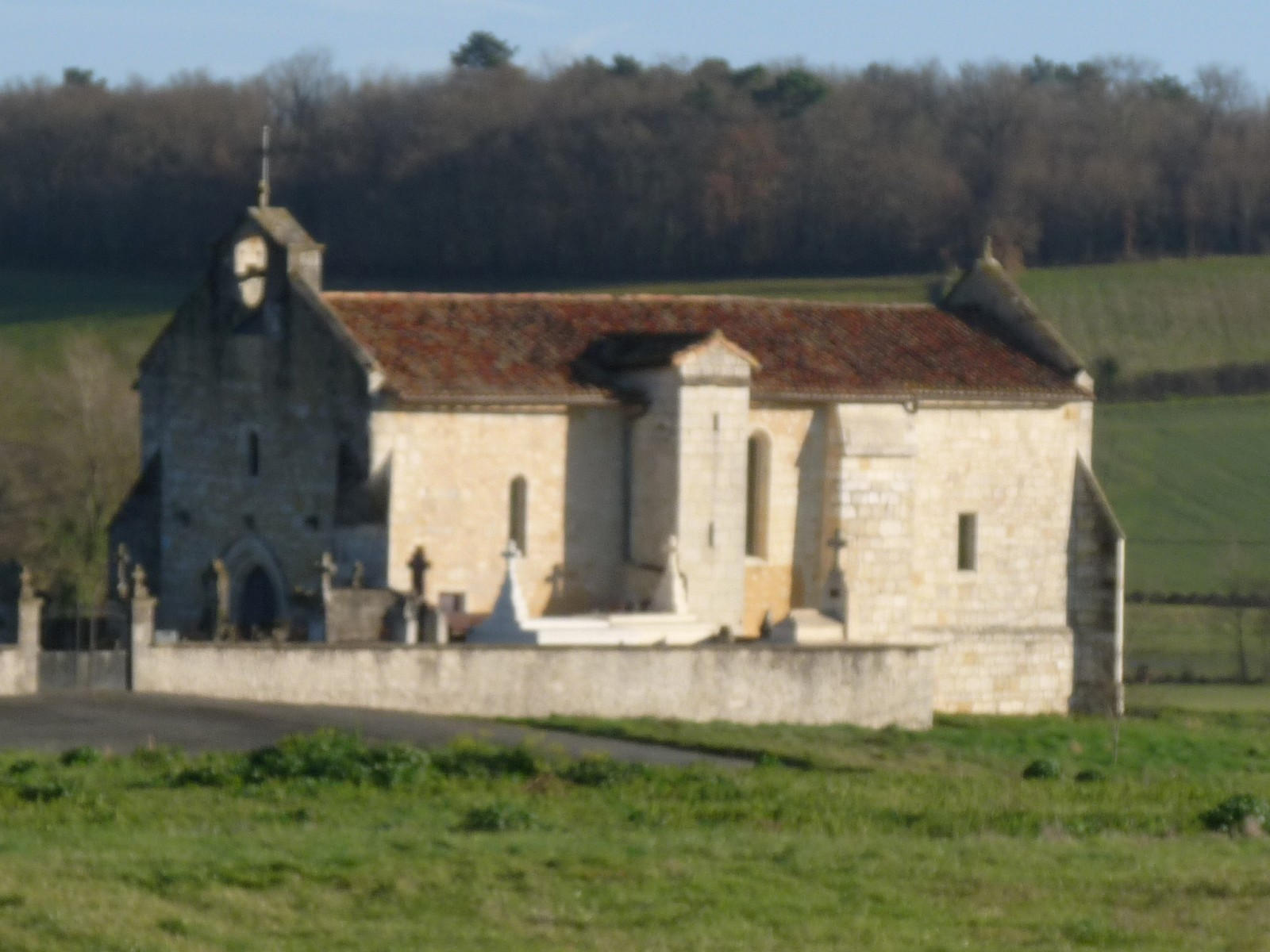 Eglise de Moulons, Charente-Maritime, France